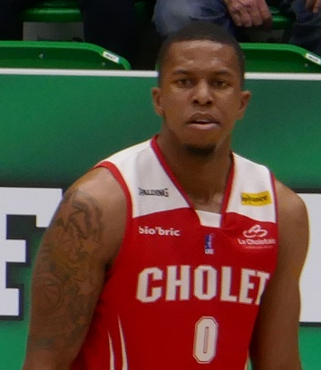 Toddrick Gotcher avec Cholet